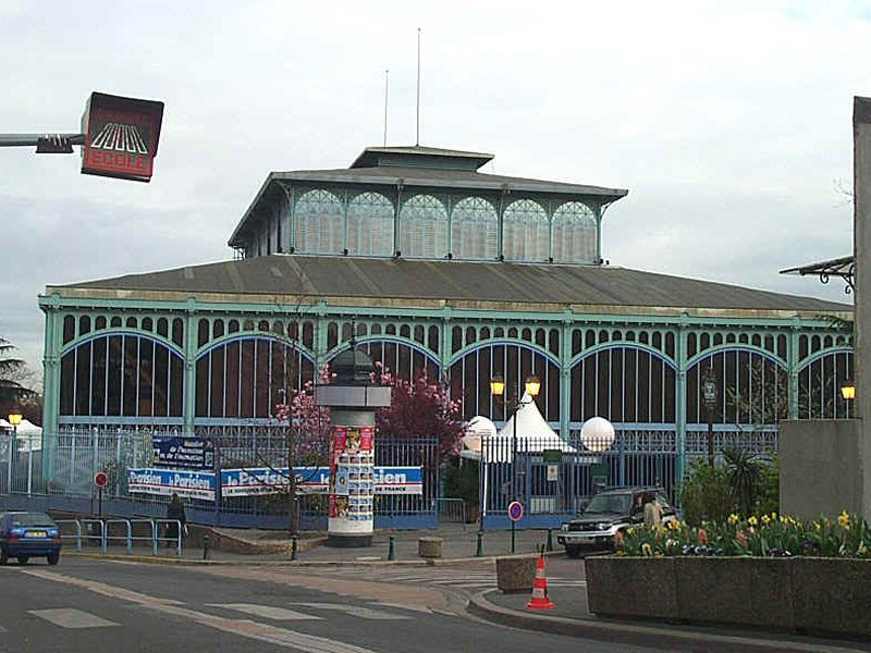 baltard.jpg